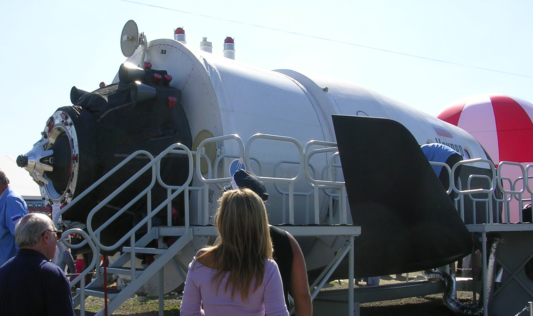 Макет космического корабля многоразового использования "клиппер" на МАКС-2005